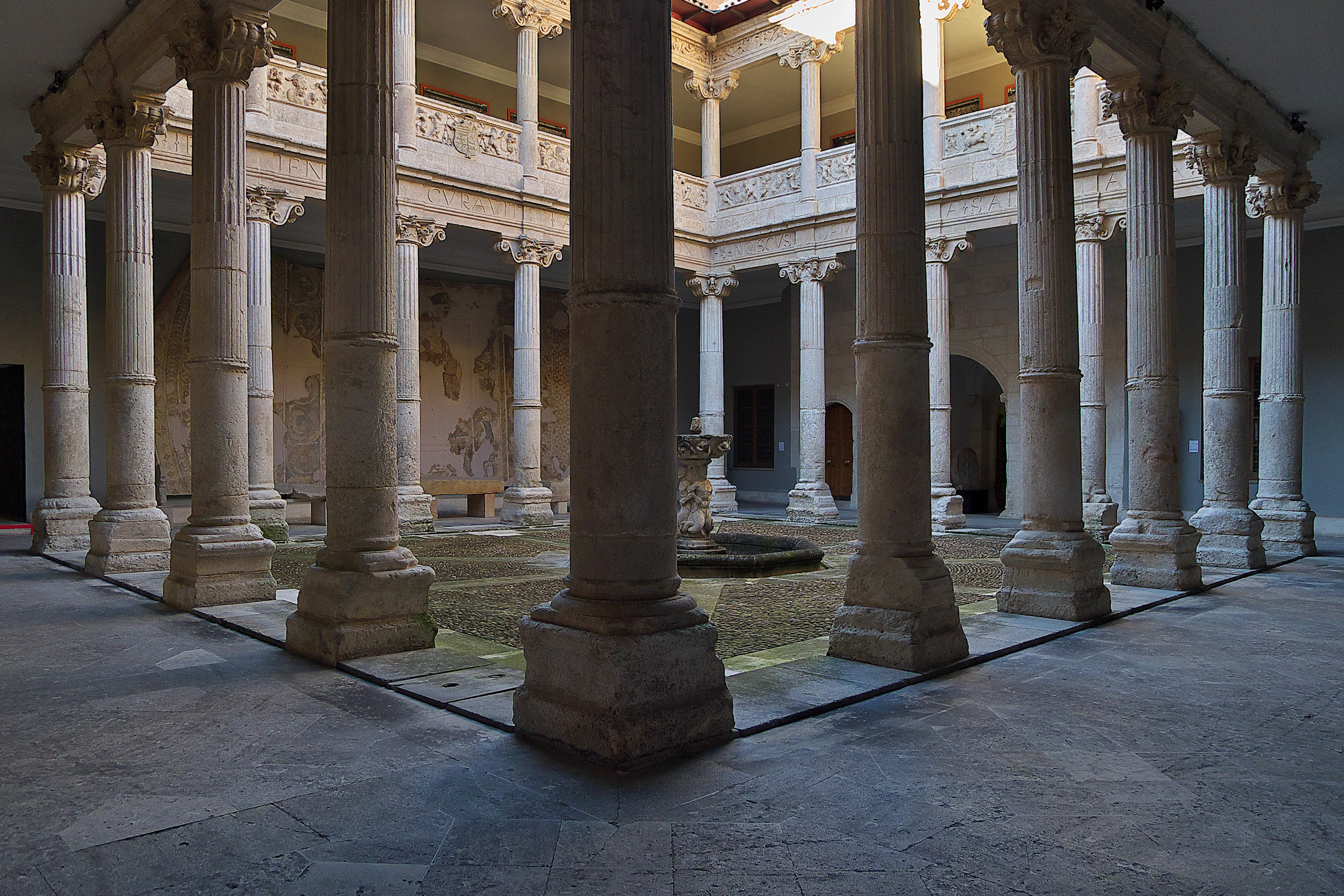 El autor (¿Juan de Vallejo?) dominaba la arquitectura renacentista. Este patio, con programa decorativo y simbólico muy interesante, es evidentemente prueba de ello.